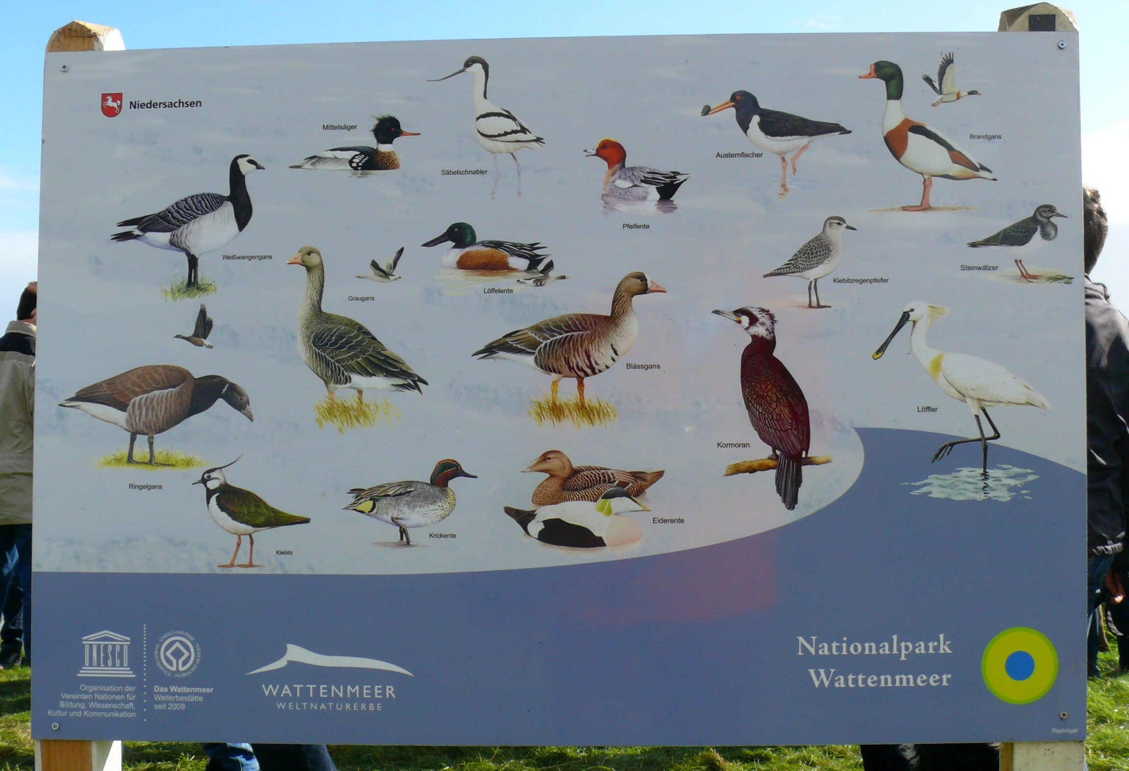 Vögel im Wattenmeer, Tafel am Vareler Hafen während der Zugvogeltage 2012